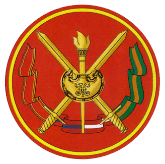 Нарукавная нашивка